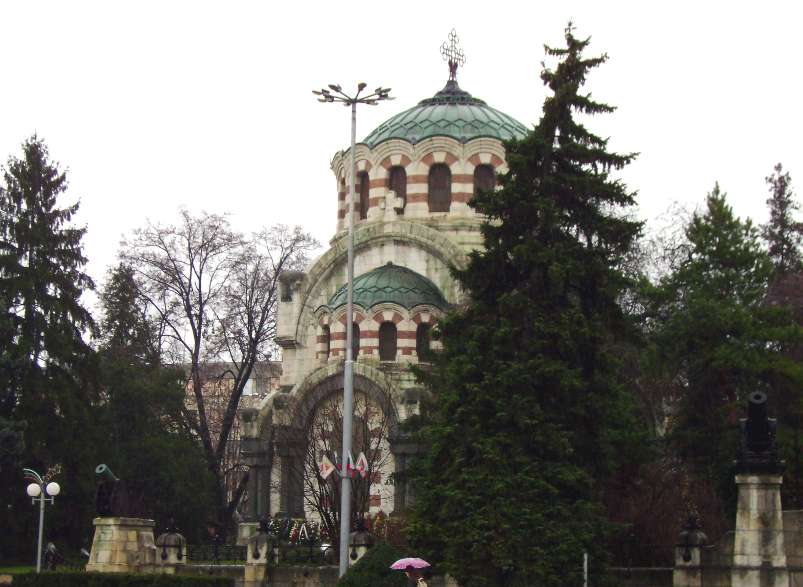 Мавзолей / Mausoleum